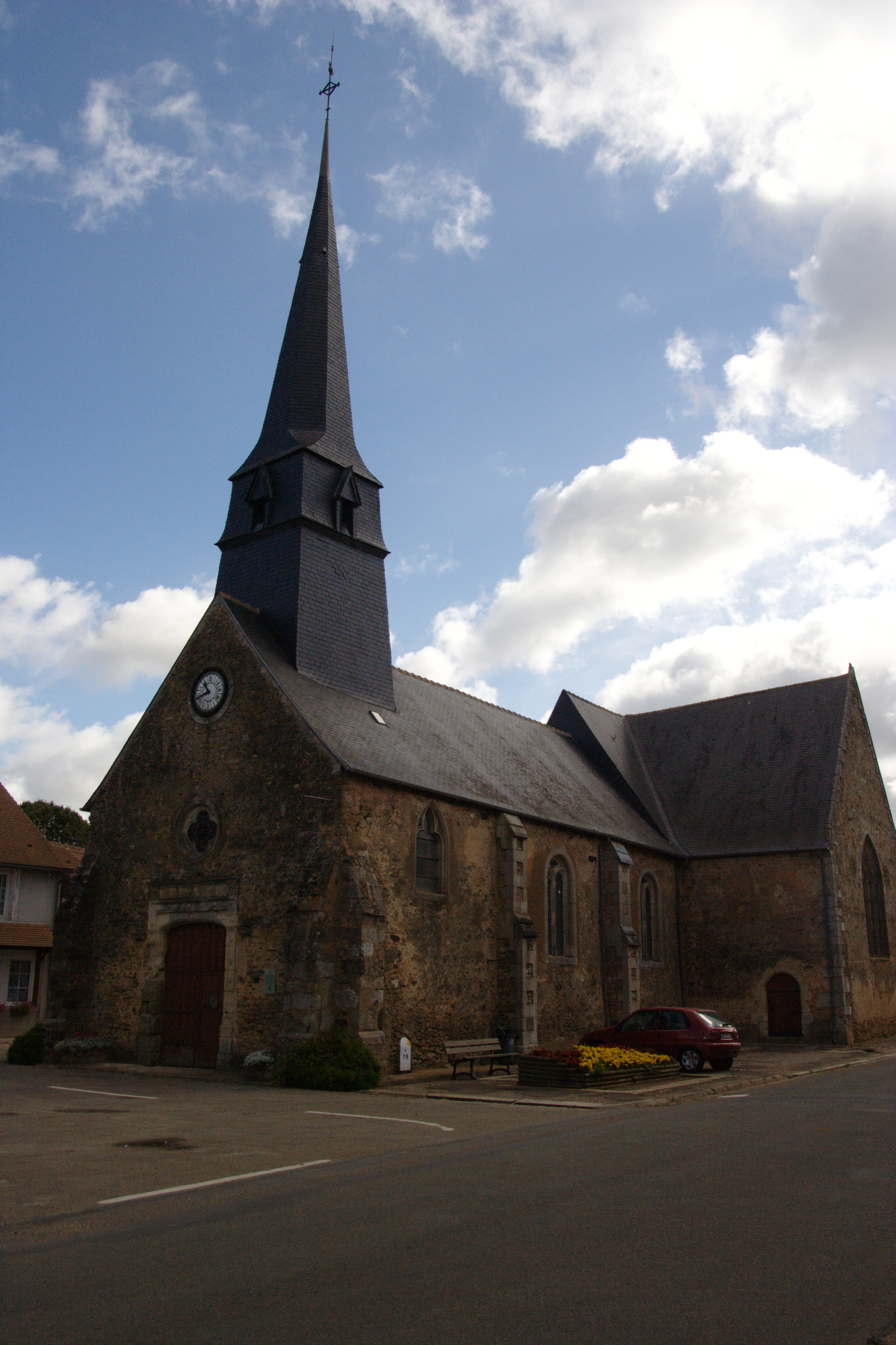 L'église Saint-Barthélemy de Courcemont.